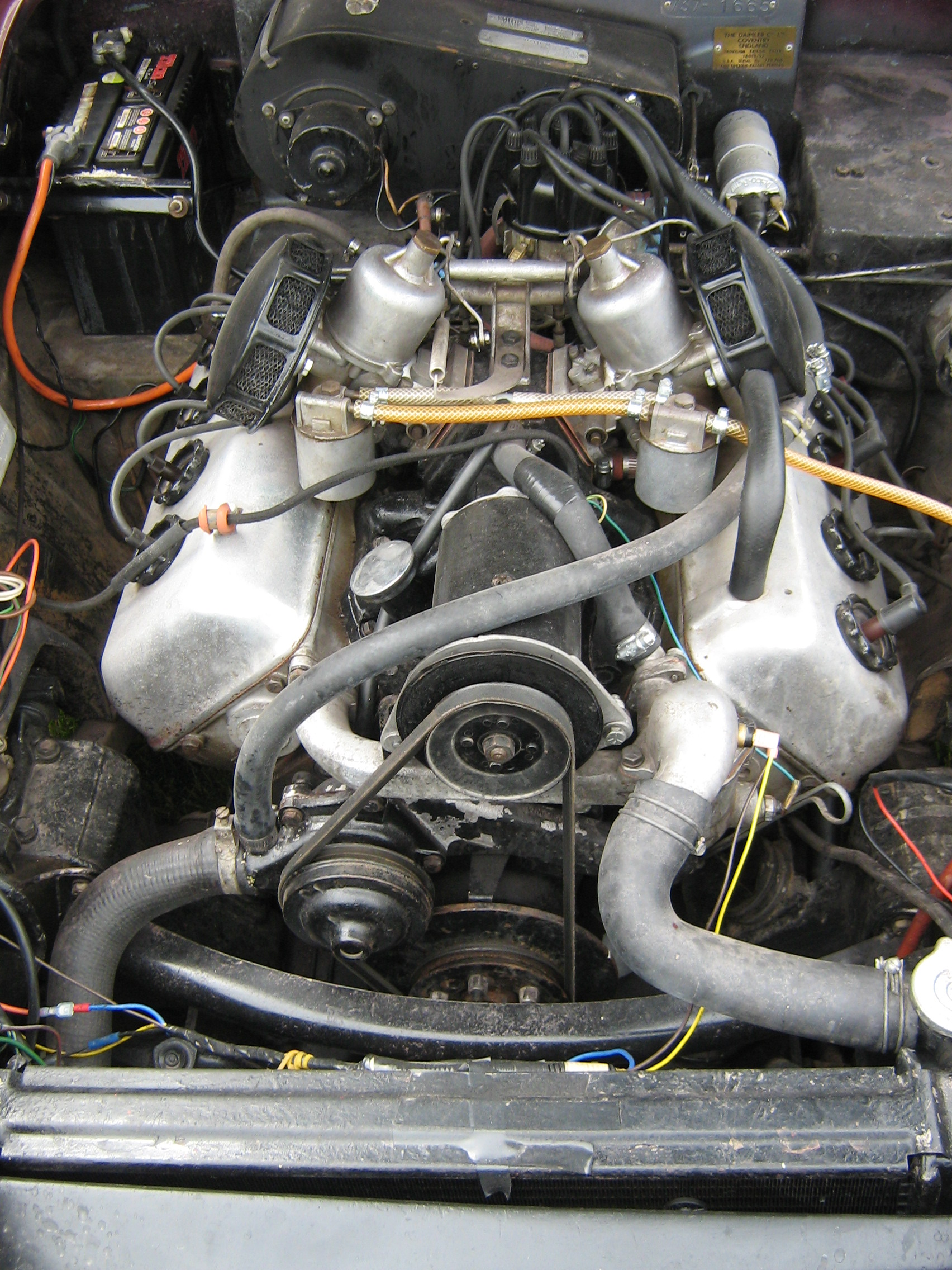 1963 Daimler SP250 V8 Engine